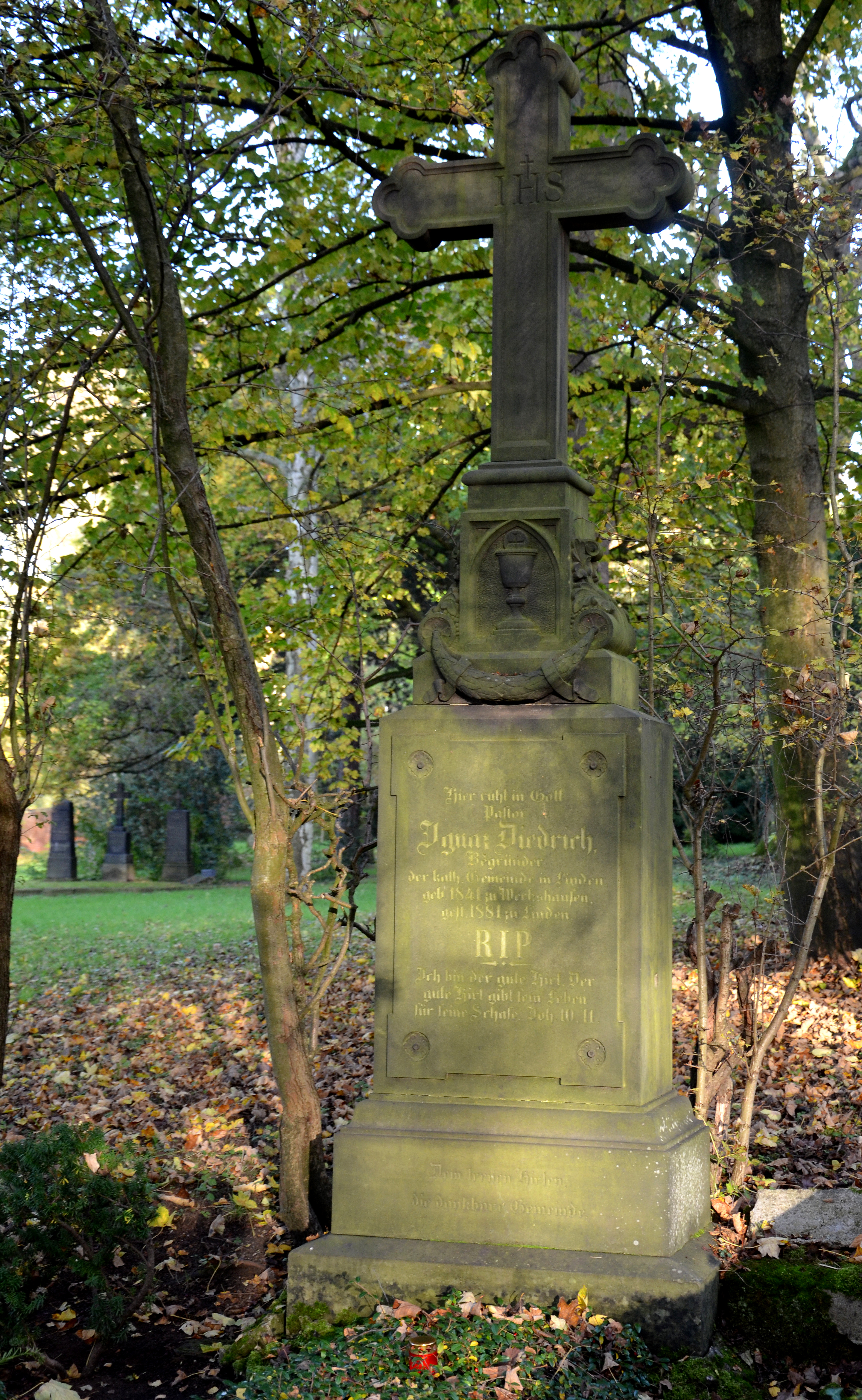 Grabmal für Ignaz Diedrich, den Pastor und Begründer der katholischen Gemeinde in Linden bei Hannover, laut Inschrift gestiftet von der dankbaren Gemeinde; gesehen im Spätherbst auf dem Lindener Bergfriedhof ...